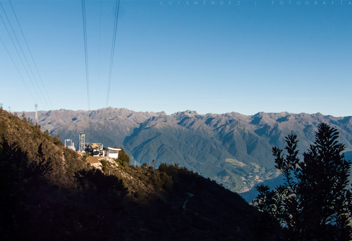 Segunda estación del teleférico de Mérida: La Aguada